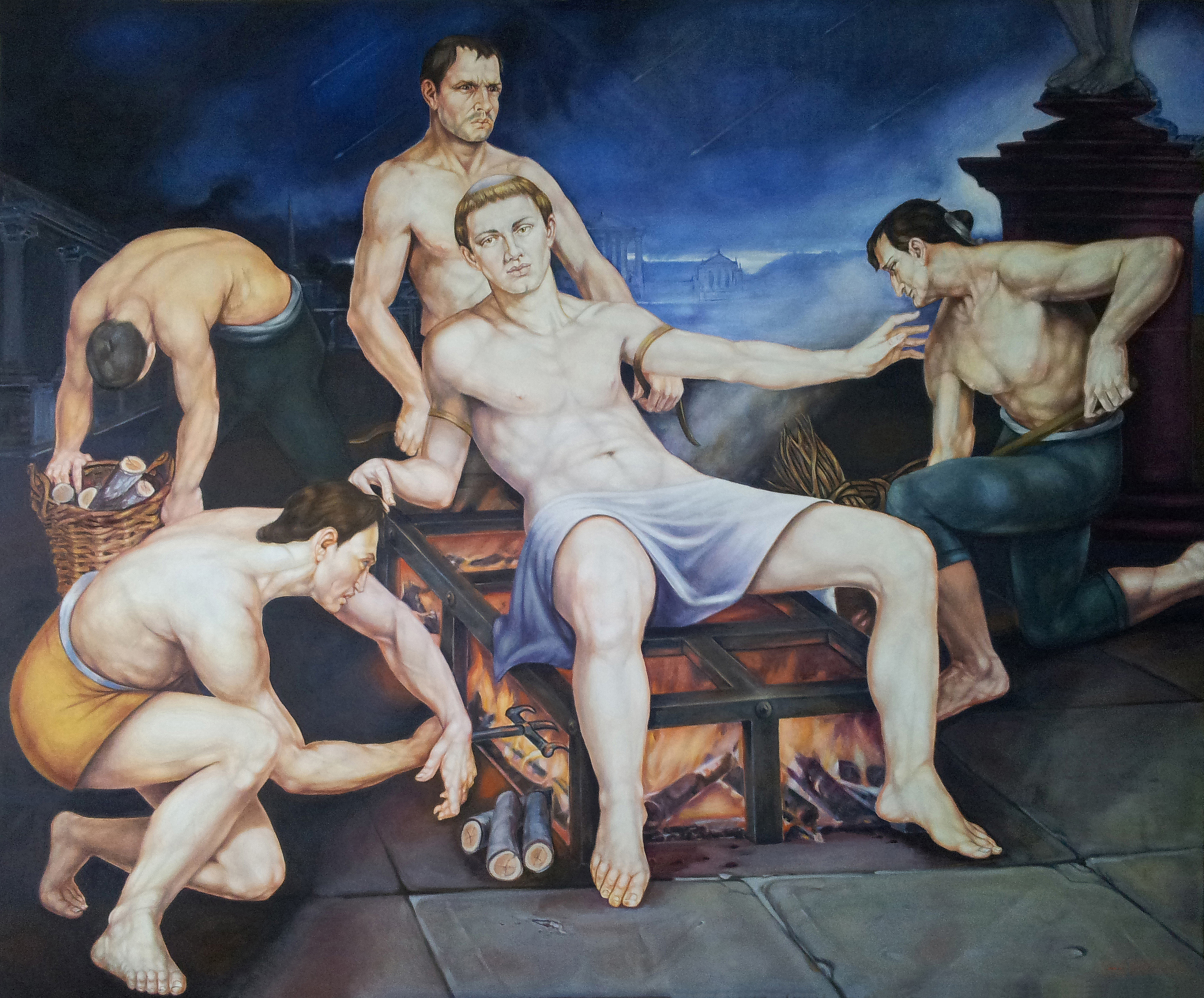 Chiesa di San Lorenzo Martire opera olio su tela - IL Martirio di San Lorenzo